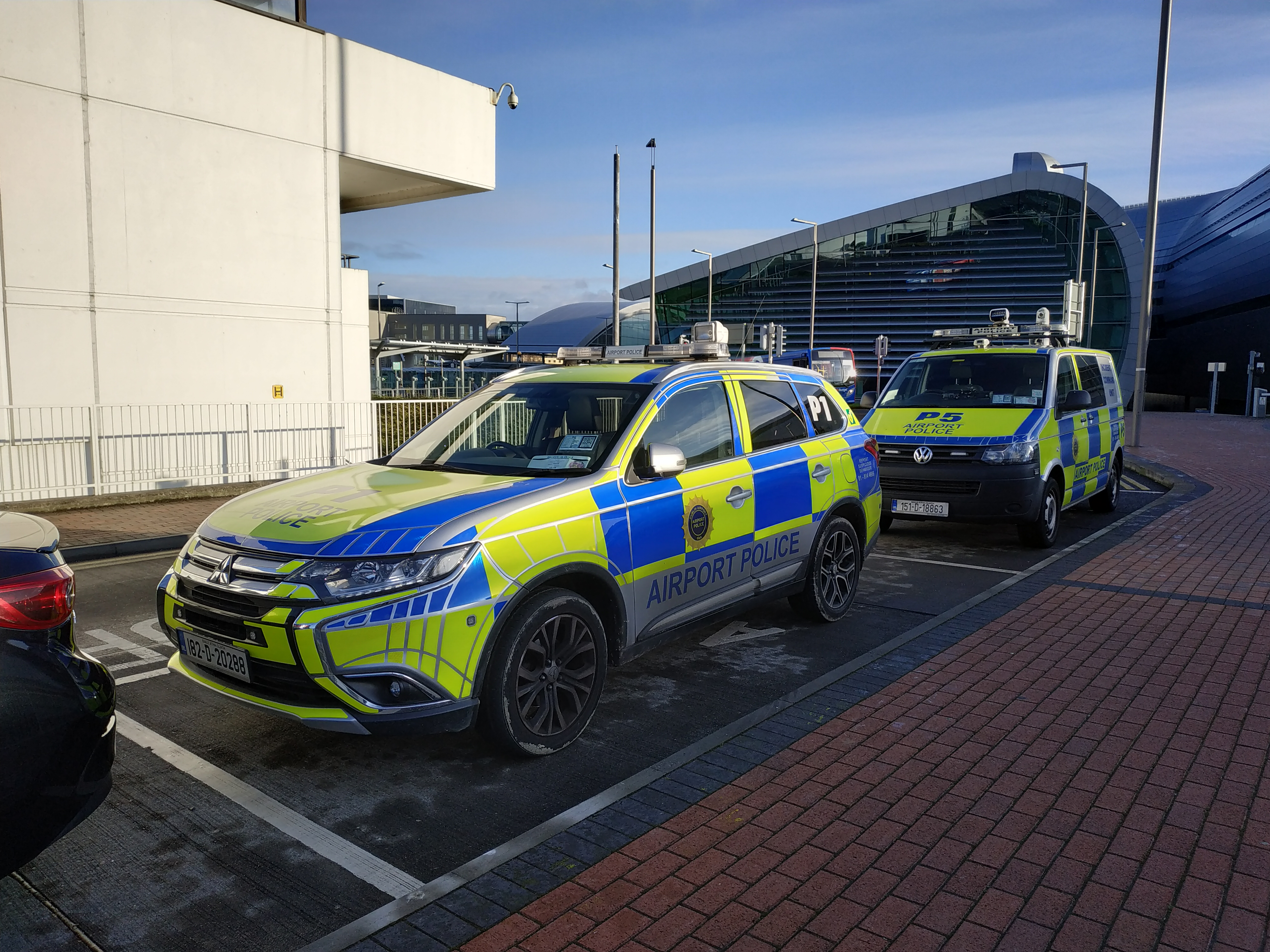 Véhicules de la police aéroportuaire de Dublin